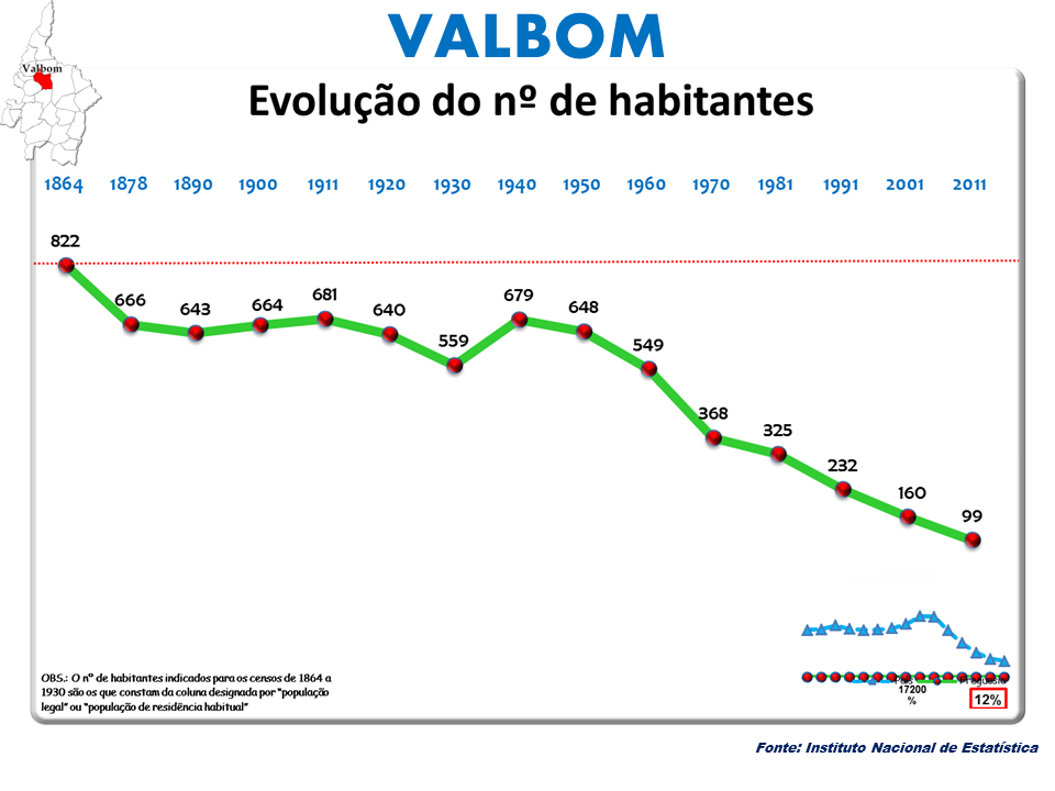 Censo 1864/2111